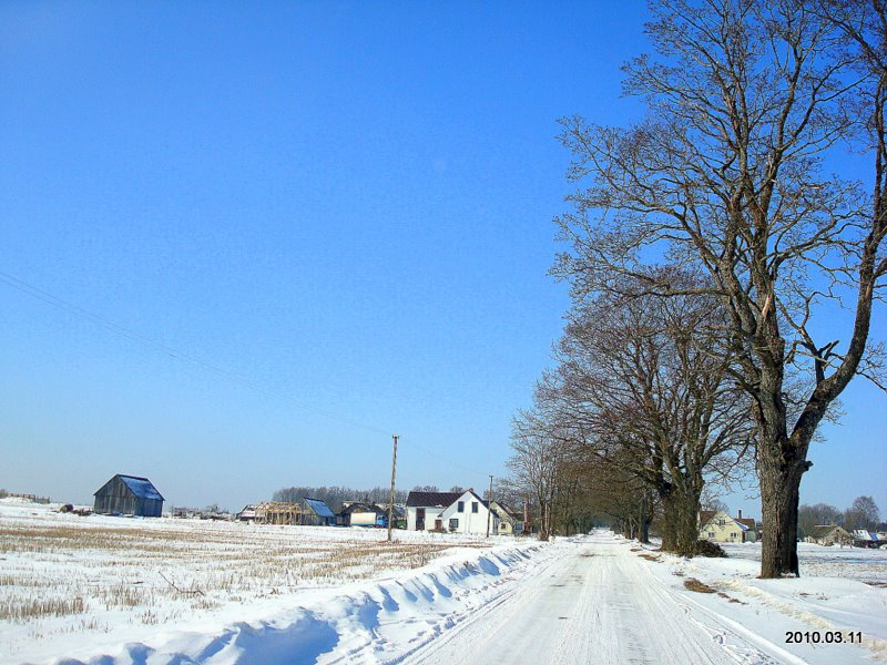 Gudulinė, Lithuania